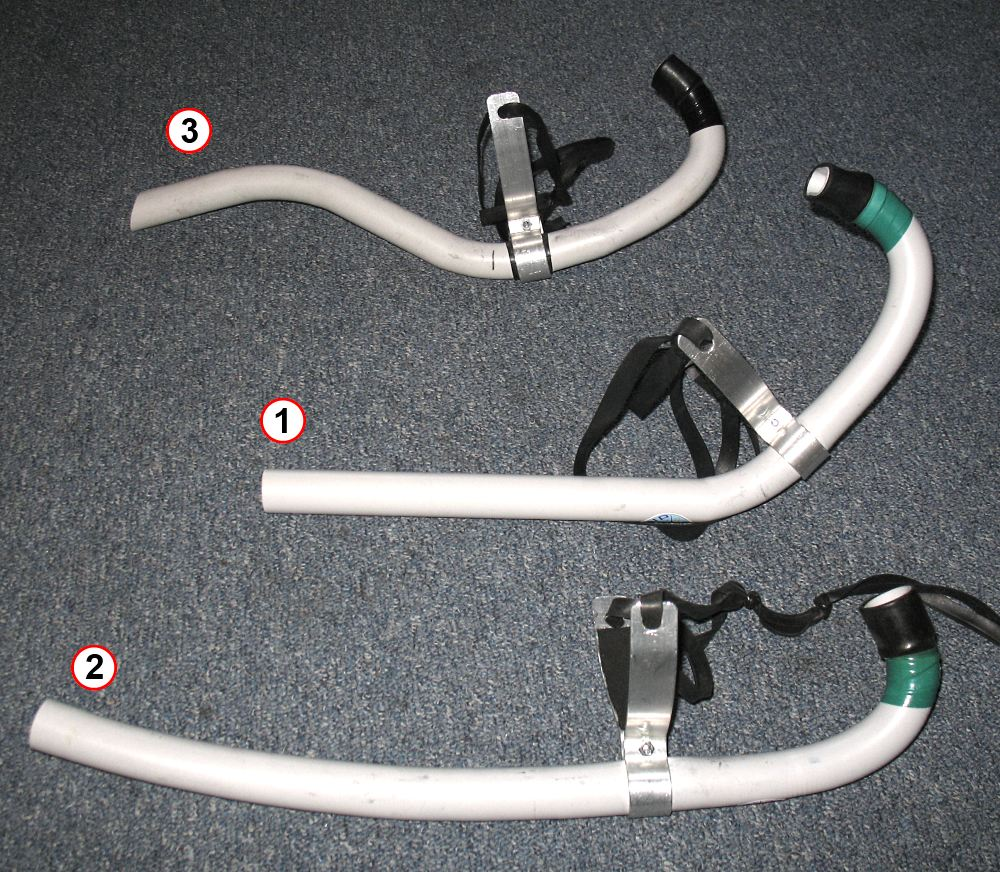 Les différents types de tubas